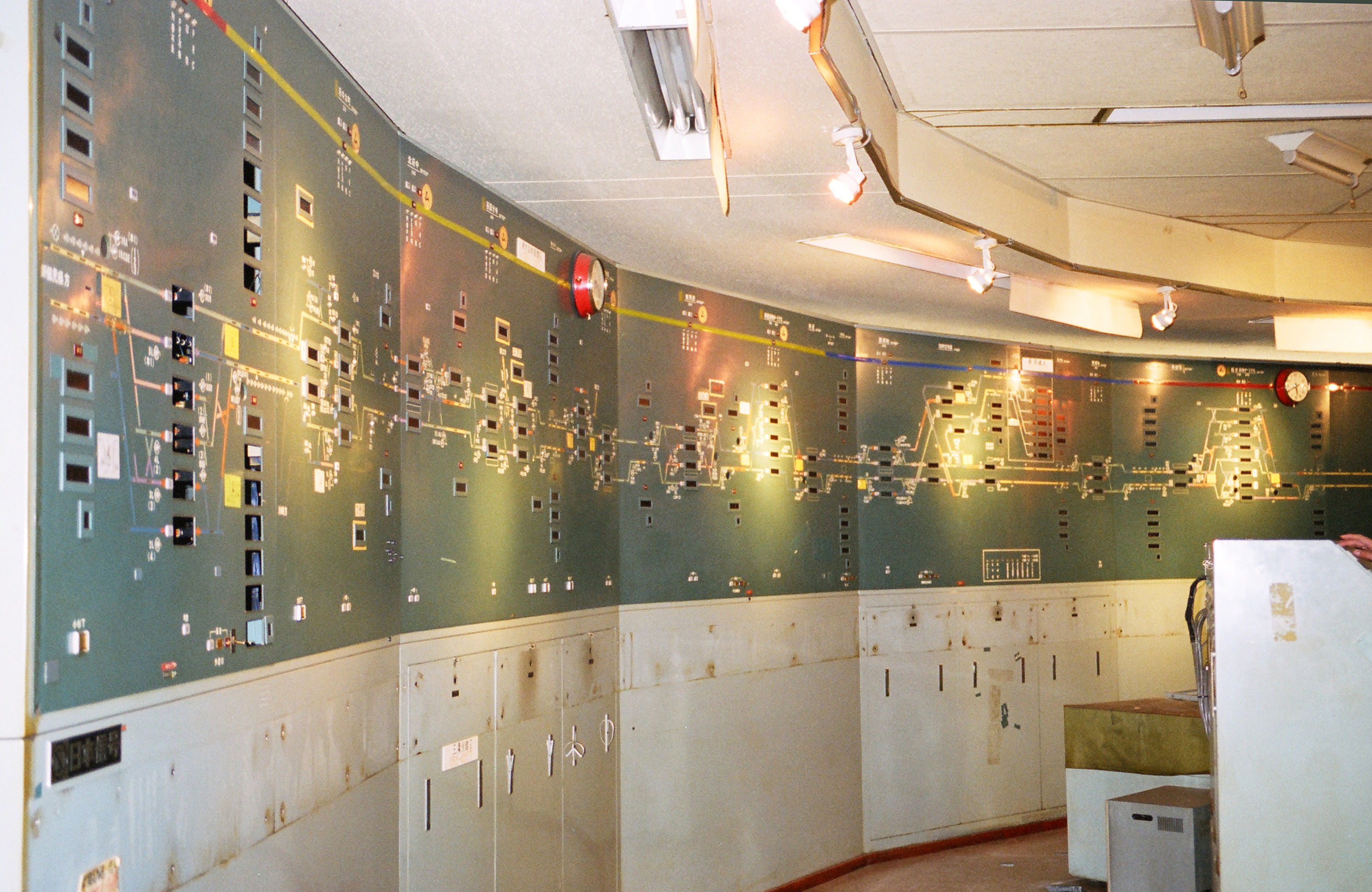 旧国鉄本社内部の指令室（1997年11月8日開催の解体前公開イベントにて）